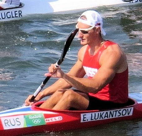 Sx50